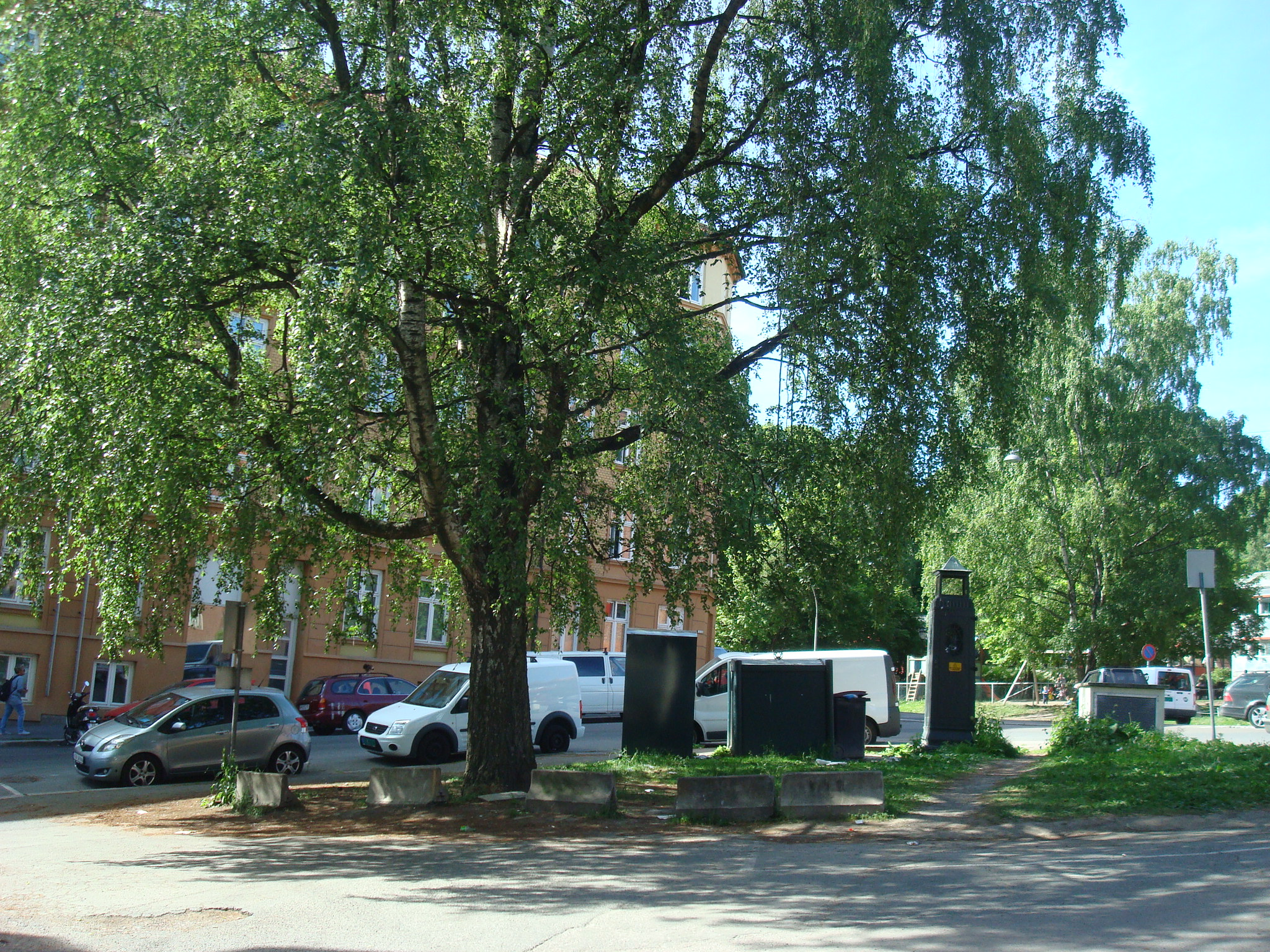 Einar Tambarskjelves plass i Oslo (2014).